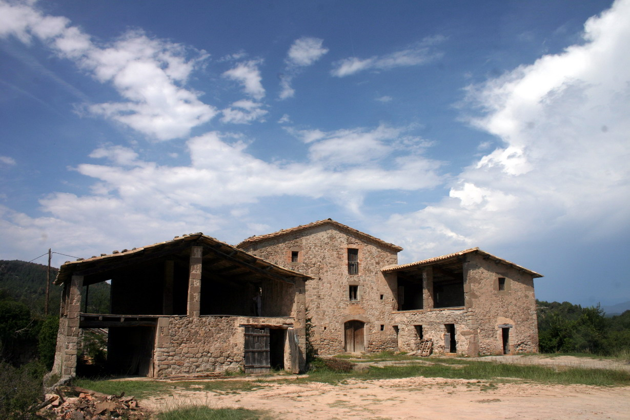 Mas El Castell, situat al peu del turó del castell de Lluçà (Osona).